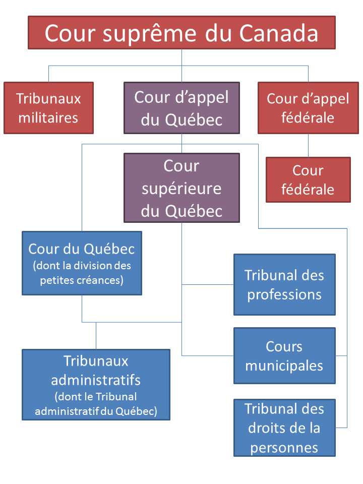 Schéma de l'organisation des tribunaux judiciaires au Québec.